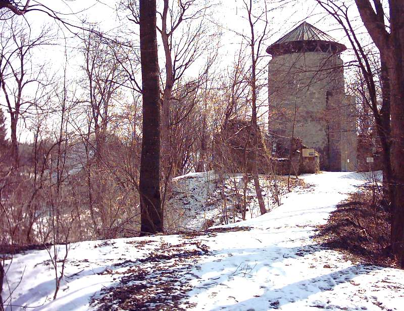 Innerer Graben und Torbereich